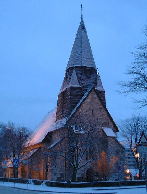 Vangskyrkja, church in Voss, Norway